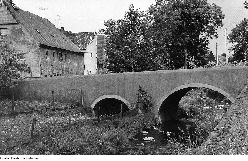 Original image description from the Deutsche FotothekKlipphausen. Saubachbrücke am Gut